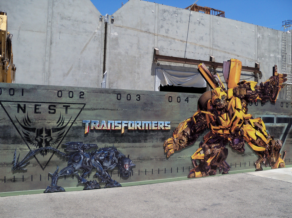 Transformers Nest